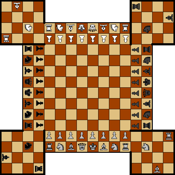 Spielfeld beim Russischen Festtungsschach mit Figuren in Grundstellung